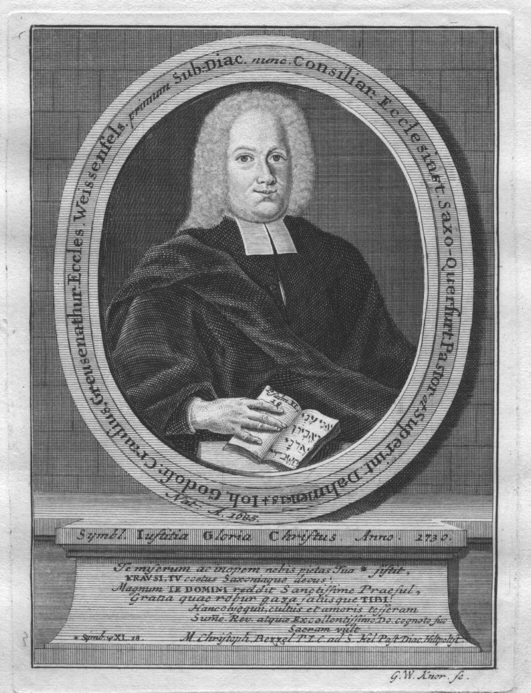 Johann Gottfried Krause (1685–1746), Kupferstich, Bild: 187×136 mm; Platte: 197×148 mm